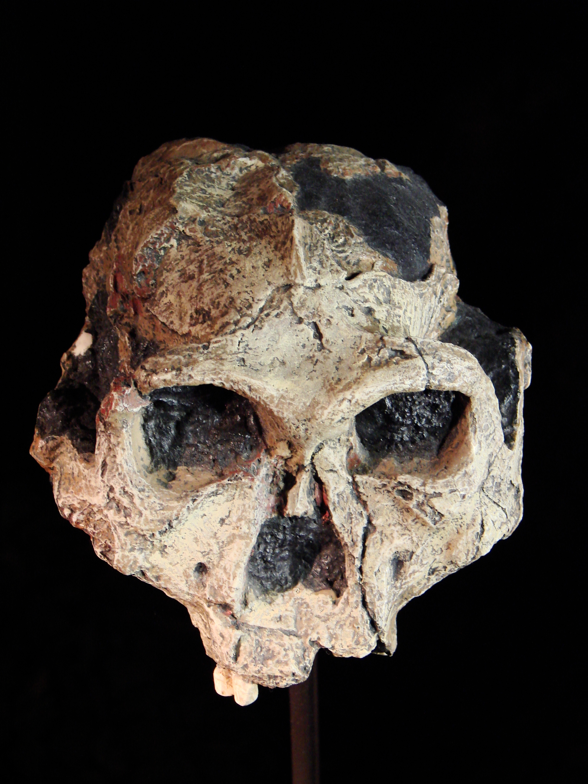 Muséum d'Anthropologie, campus universitaire d'Irchel, Université de Zurich (Suisse) : Moulage du crâne de Paranthropus robustus, crâne SK-48 (Swartkrans,Afrique du sud)